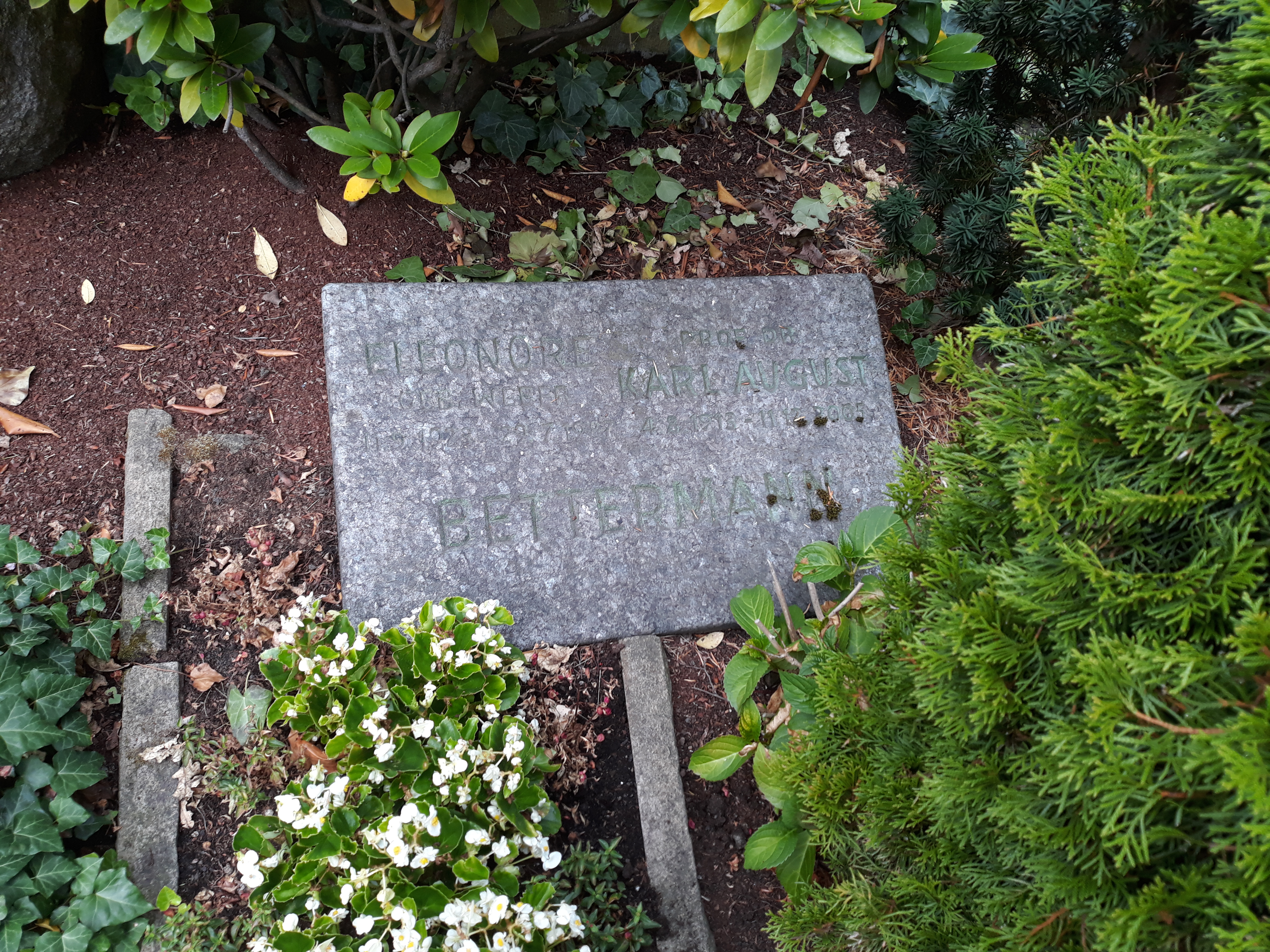 Das Grab des deutschen Juristen Karl August Bettermann und seiner Ehefrau Eleonore auf dem Buschey-Friedhof in Hagen (Westfalen).